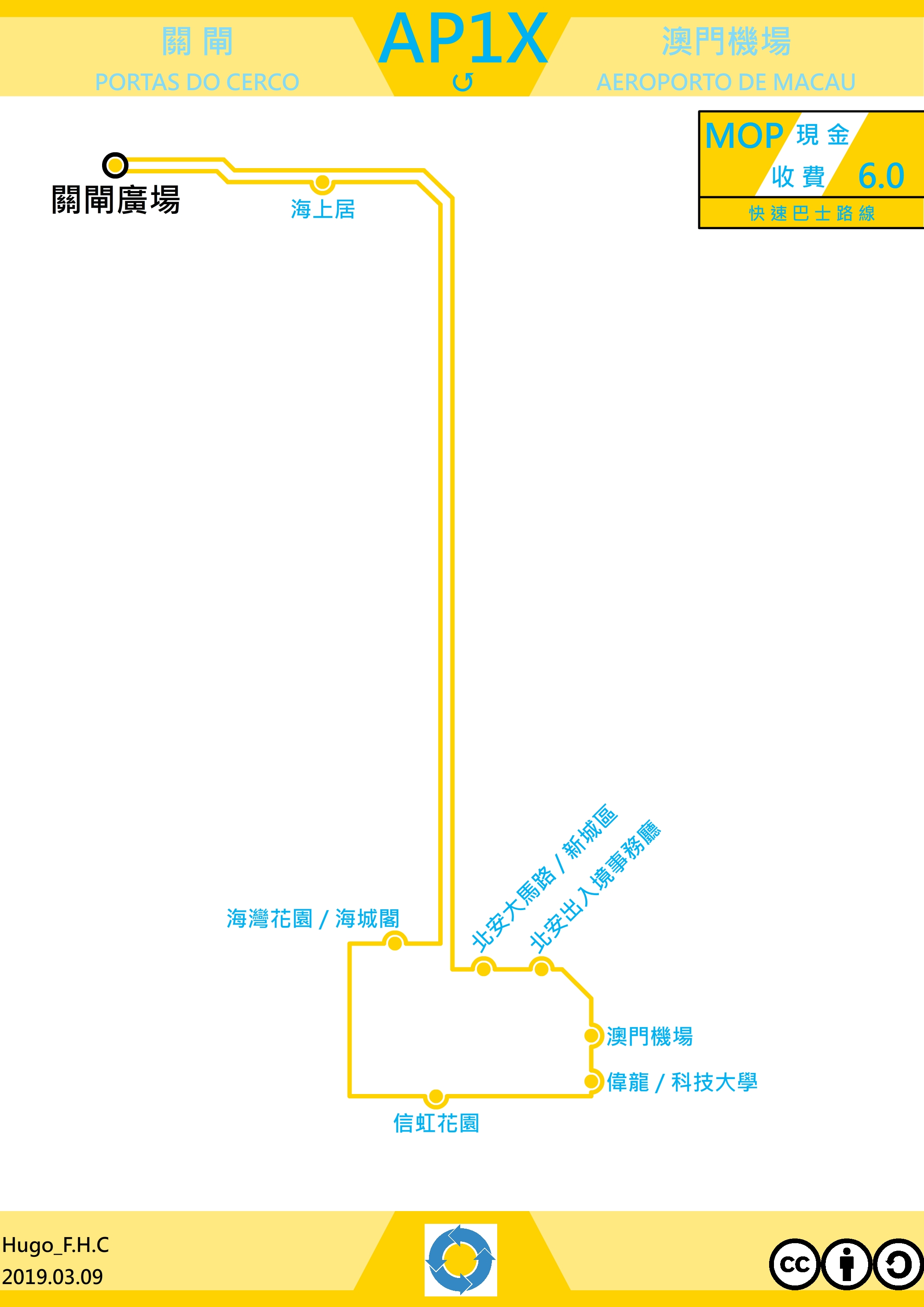 澳門巴士AP1X路線(走線圖)